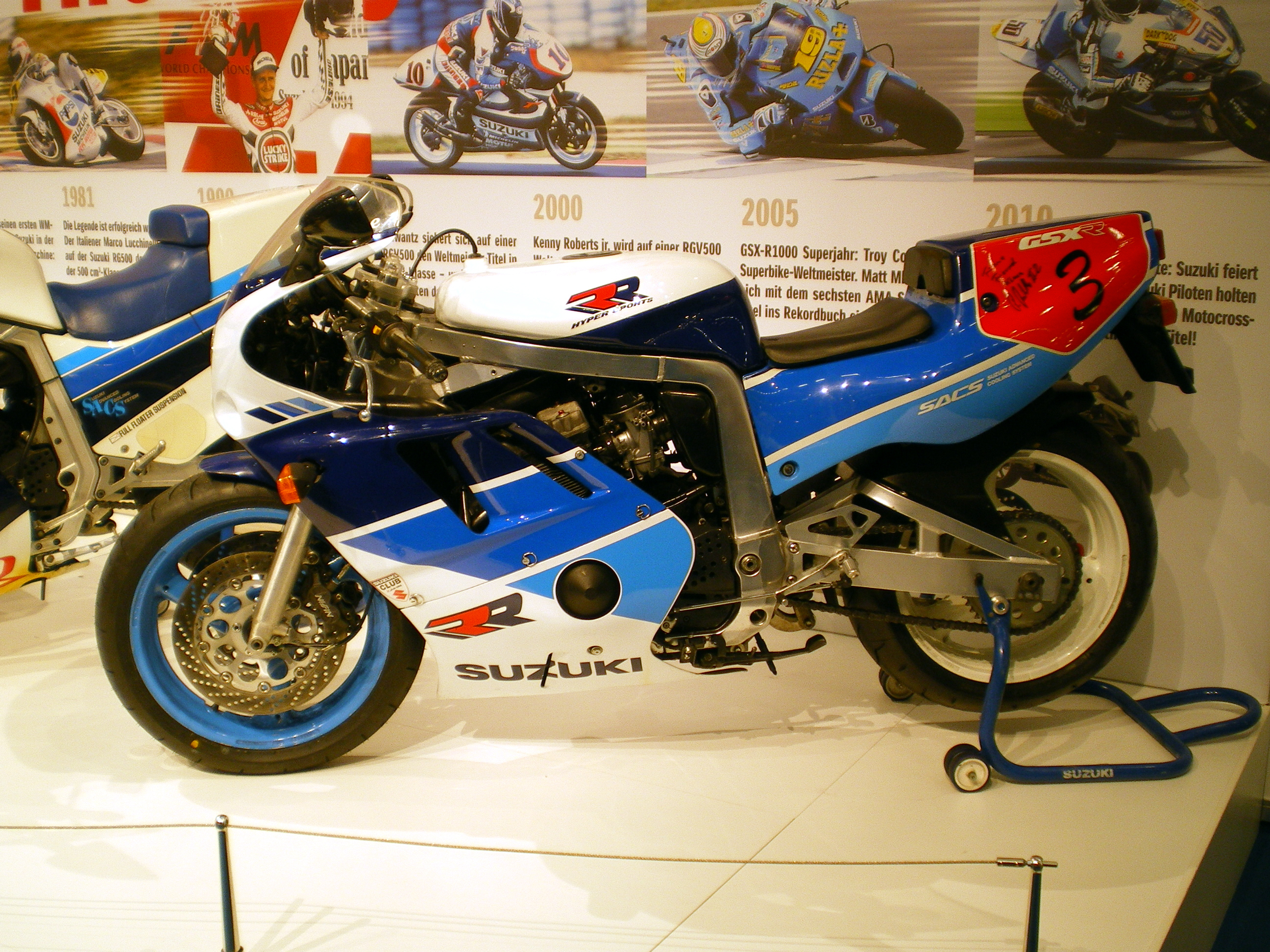 Photo prise au salon Intermot Köln 2010